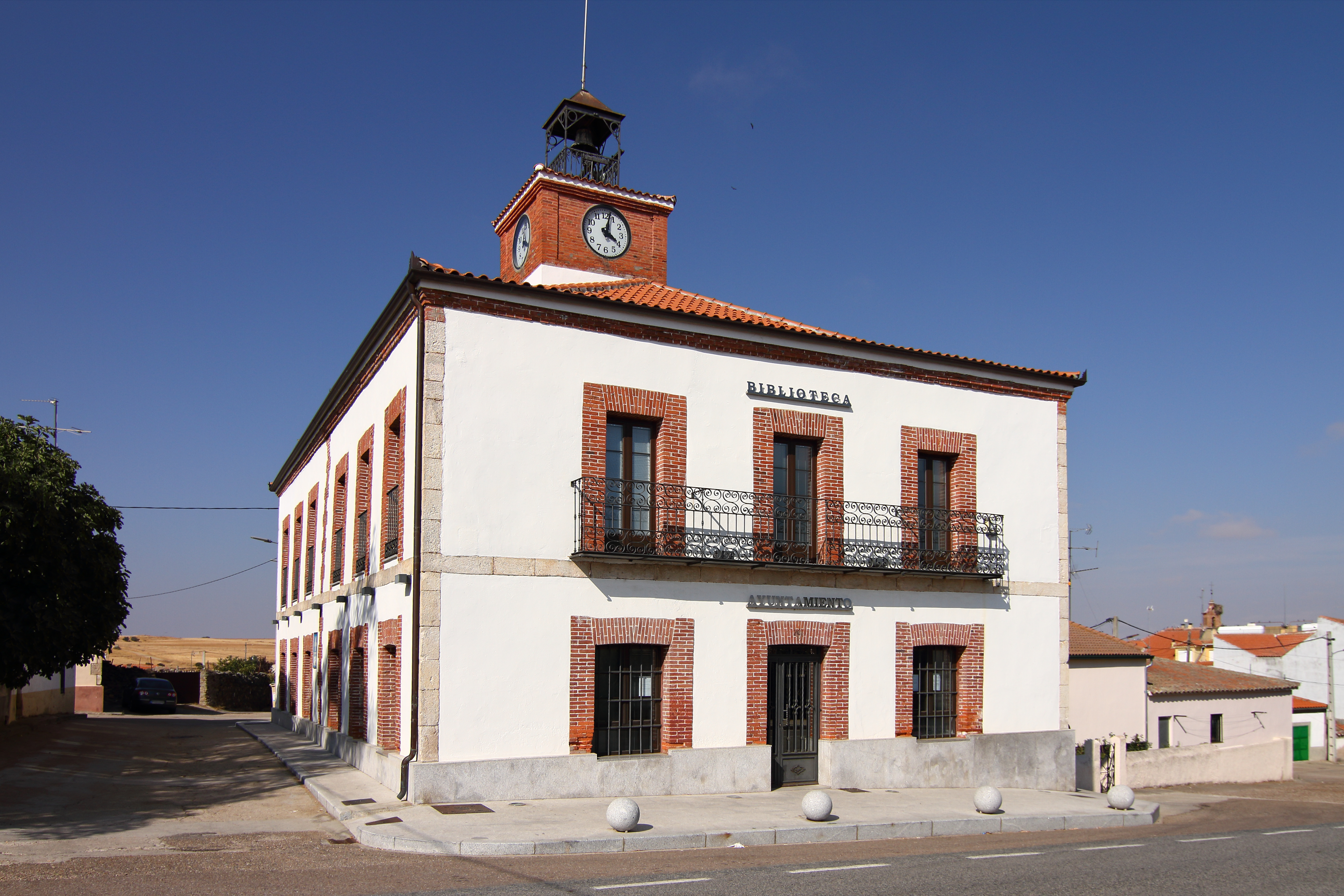 Ayuntamiento de Mozárbez, edificio de 1903